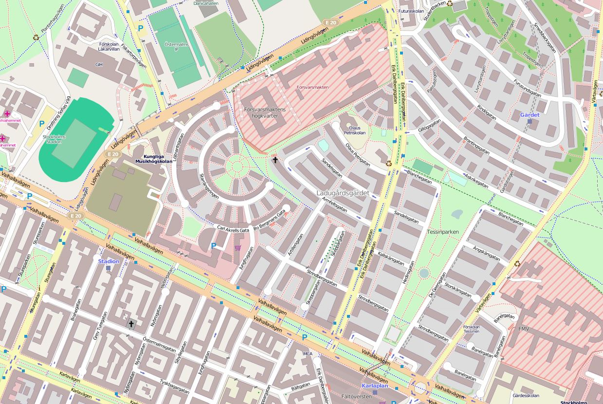 Del av 2013 års karta över Stockholm visande Starrbäcksängen, Gärdet